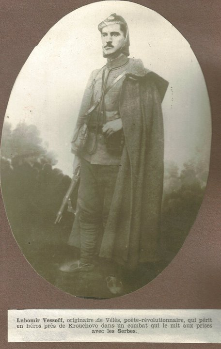 IMRO member Lyubomir Vesov from Veles